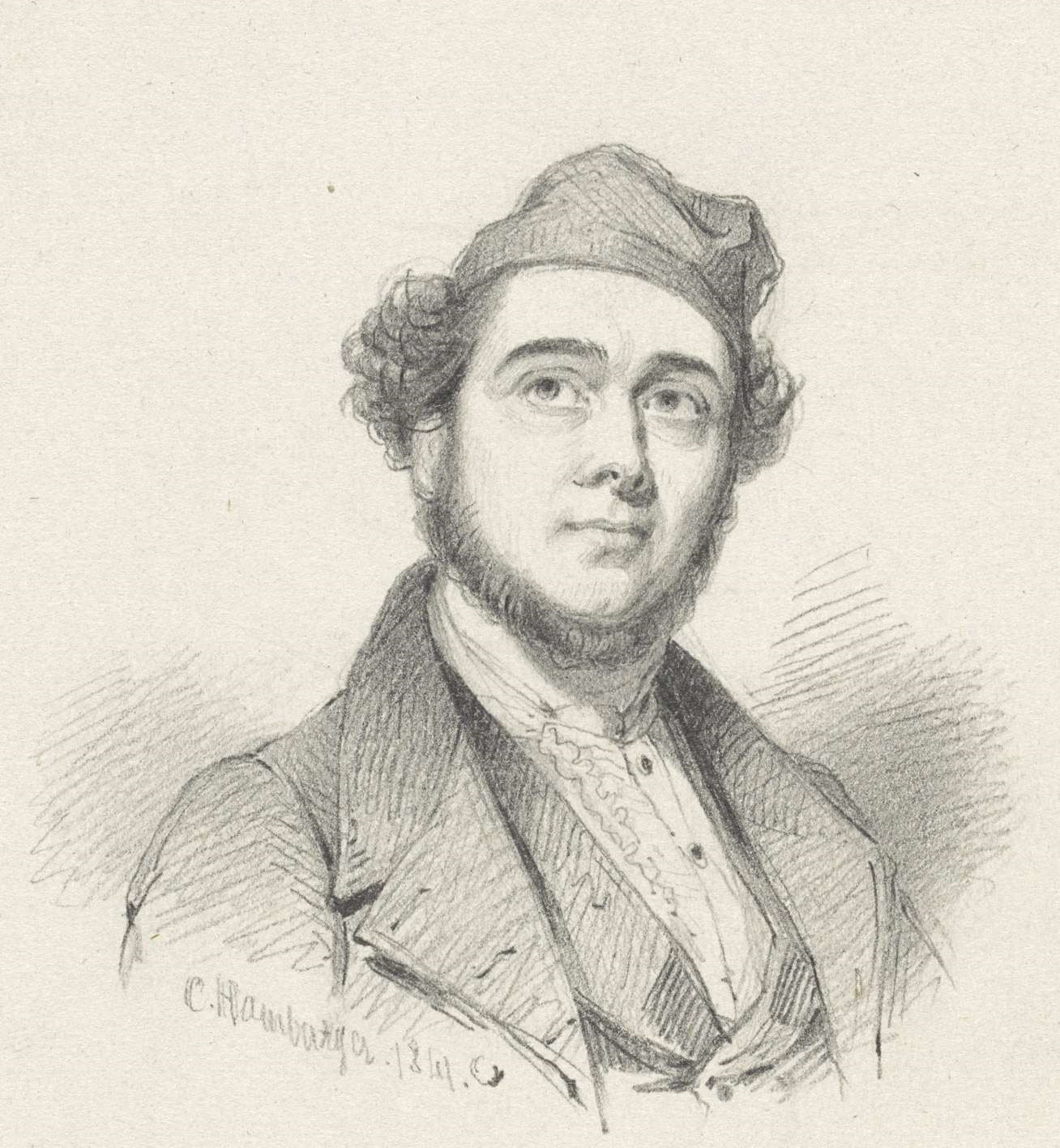 Portret van Petrus van Schendel (RP-T-1940-274).